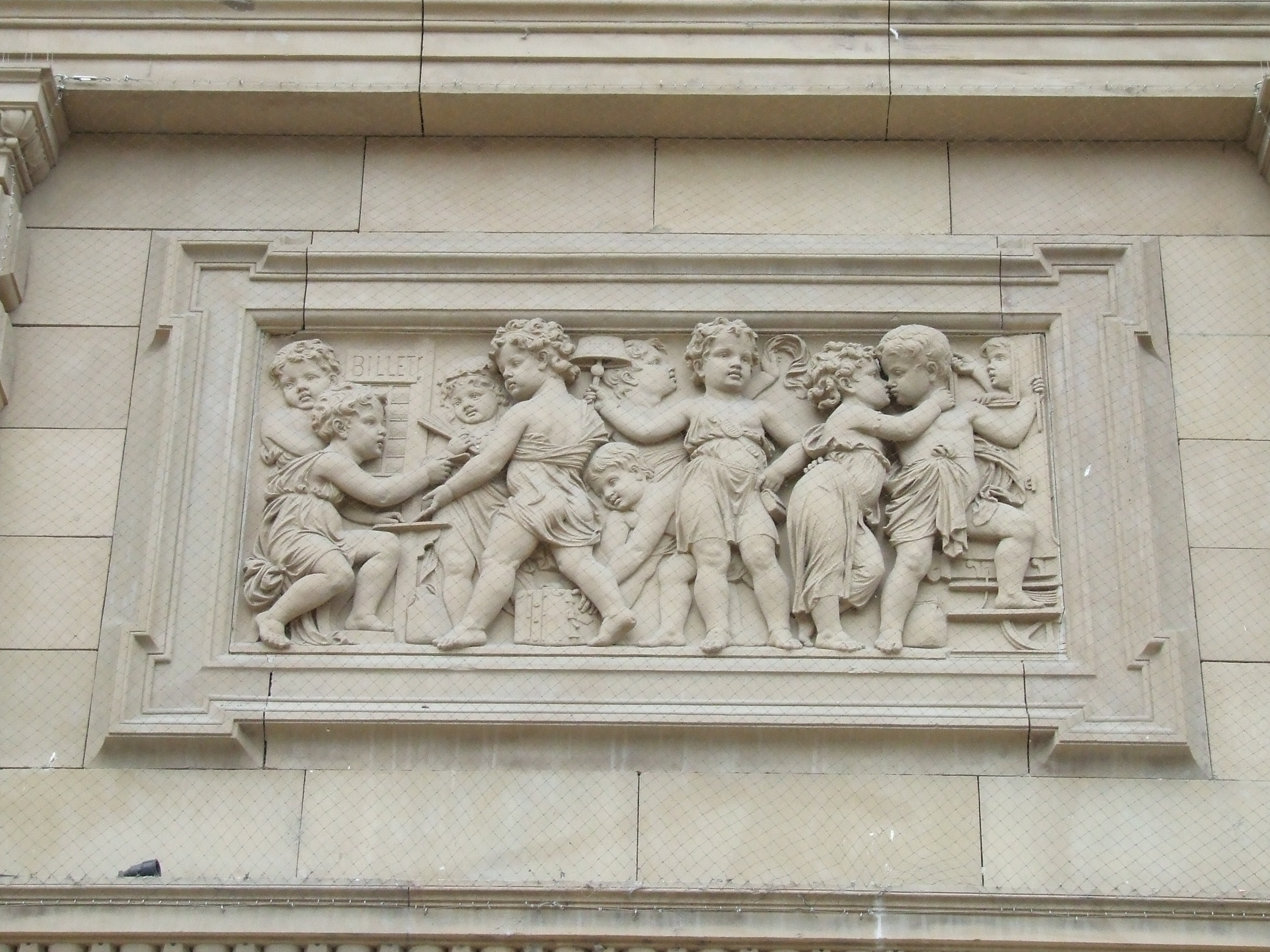 Mainz Hauptbahnhof in Mainz. Central Station, Mainz, Germany